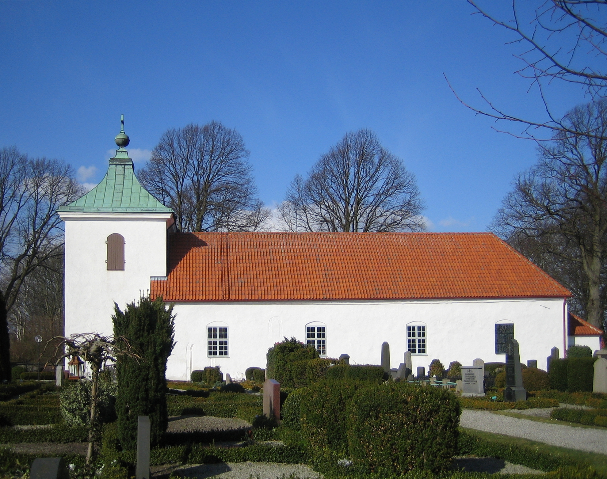 Barsebäcks kyrka in Skåne, Sweden